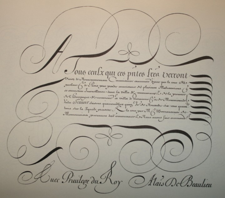 Alais : exemple de calligraphie 1648